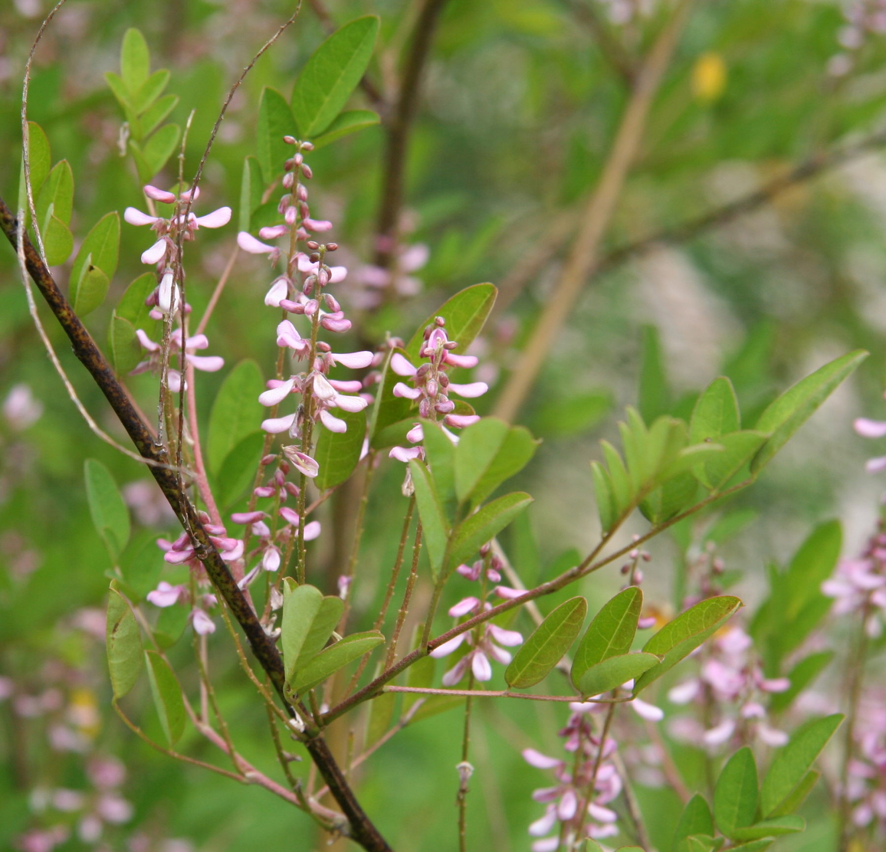 Indigofera potaninii im Botanischen Garten Dresden